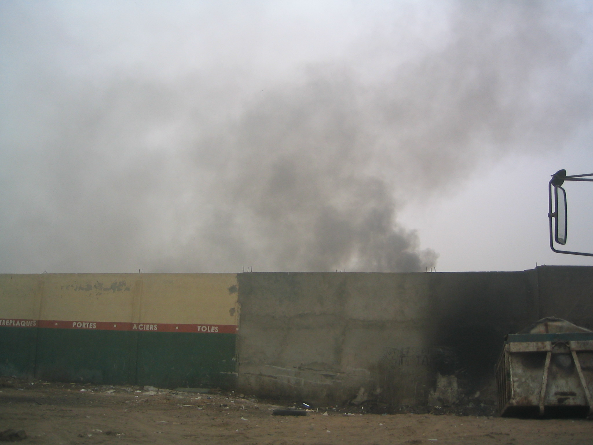 Zone polluée au bord de l'autoroute, à l'entrée de Dakar (Sénégal)